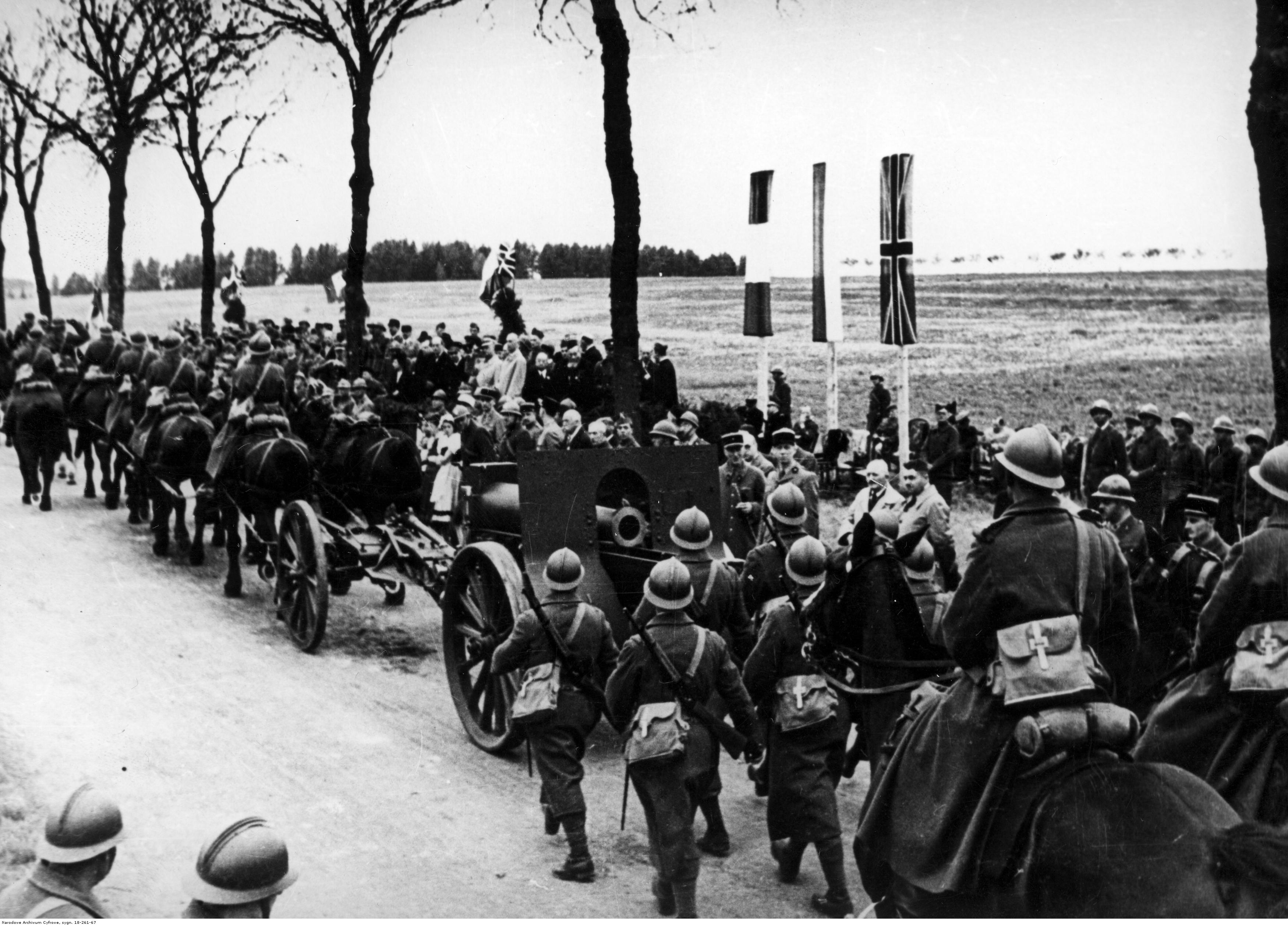 1 Dywizja Grenadierów Wojska Polskiego we Francji - obchody święta 3 Maja 1940 r. i uroczystość nadania miana Grenadierów odbywające się przy szosie Autreville-Martigny. Defiluje artyleria ciężka - widoczny zaprzęg ze 155 mm haubicą Schneider wz. 1917. Archiwum Fotograficzne Czesława Datki. Sygnatura: 18-261-67